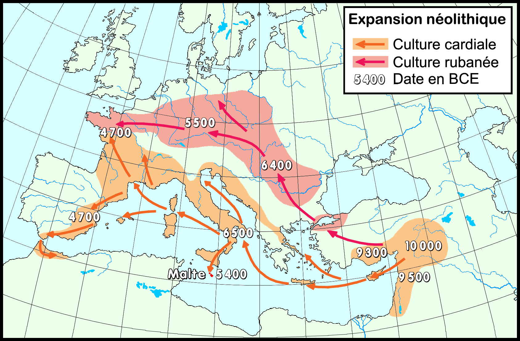 premier peuplement maltais lors de l'expansion néolithique